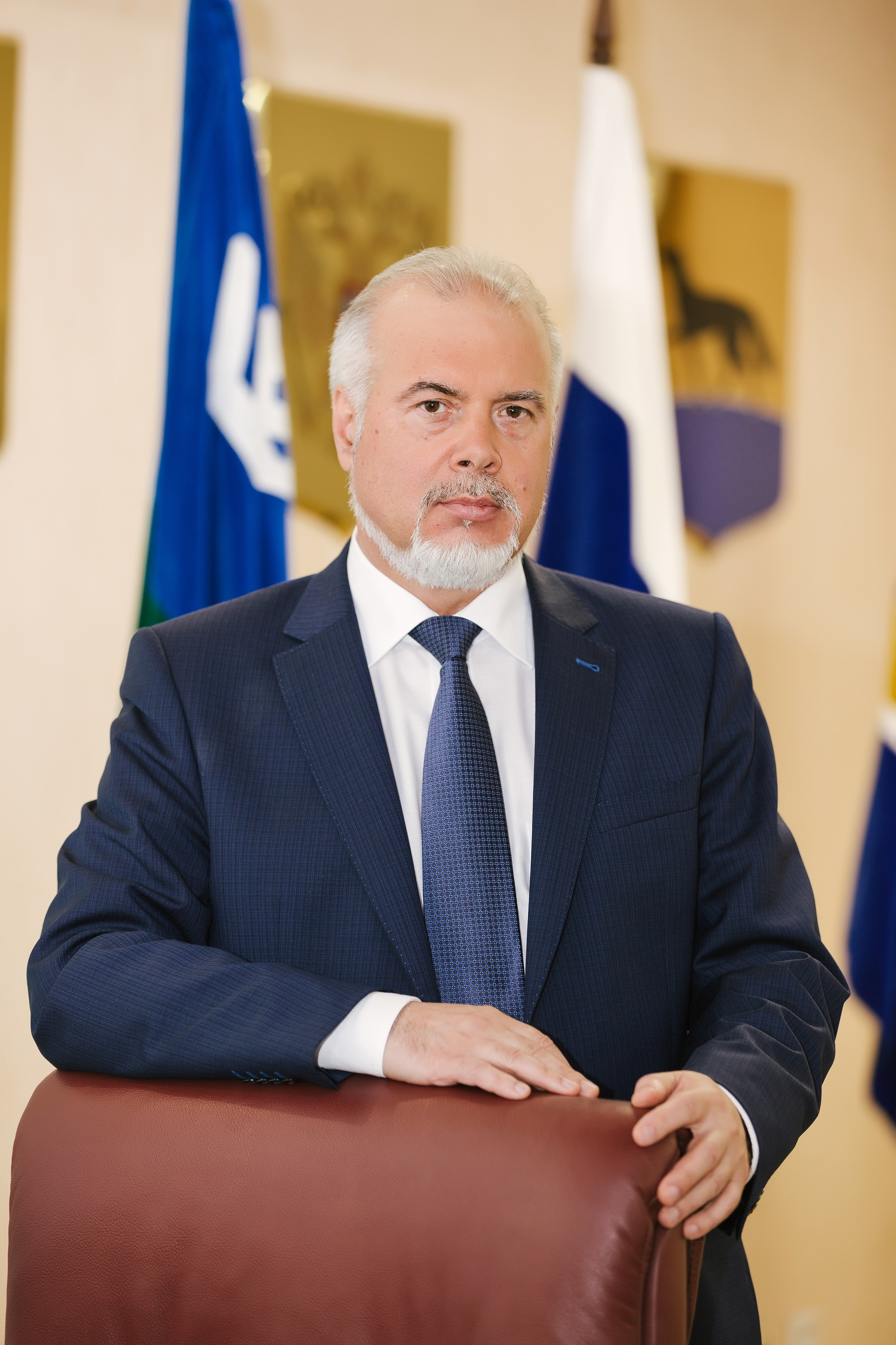 Вадим Шувалов, глава города Сургута